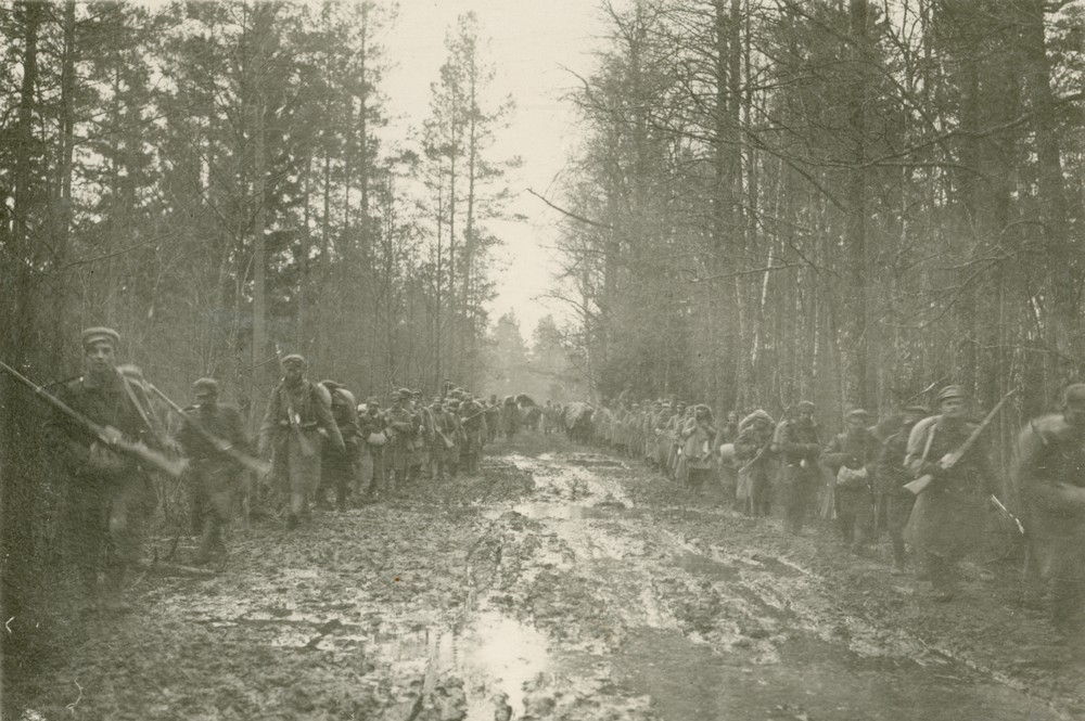 Kolumna I pułku piechoty Legionów Polskich podczas przemarszu przez bagno. Czerewacha, Wołyń.